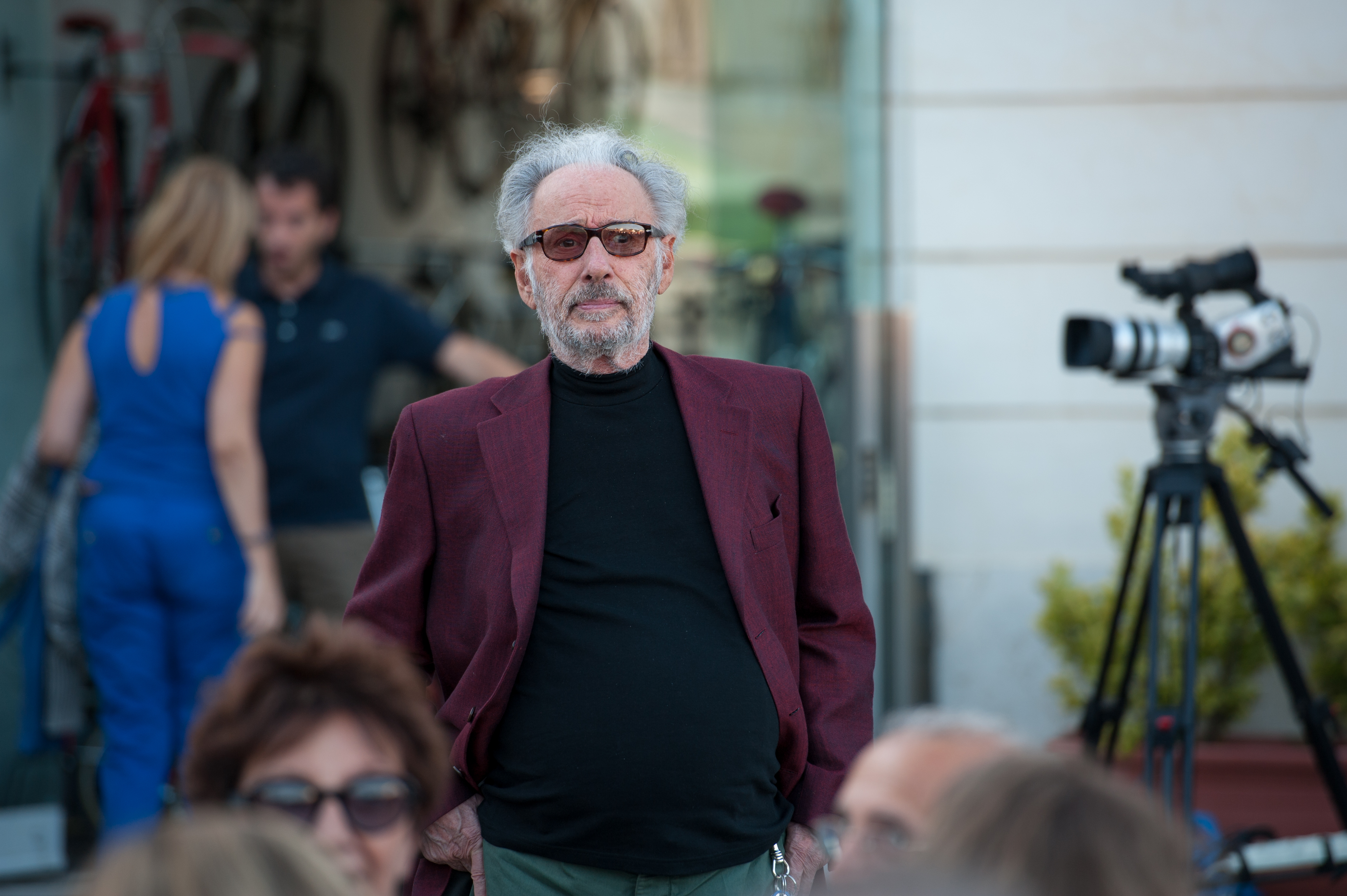 Massimo Fagioli alla festa di Left del 14 settembre del 2013